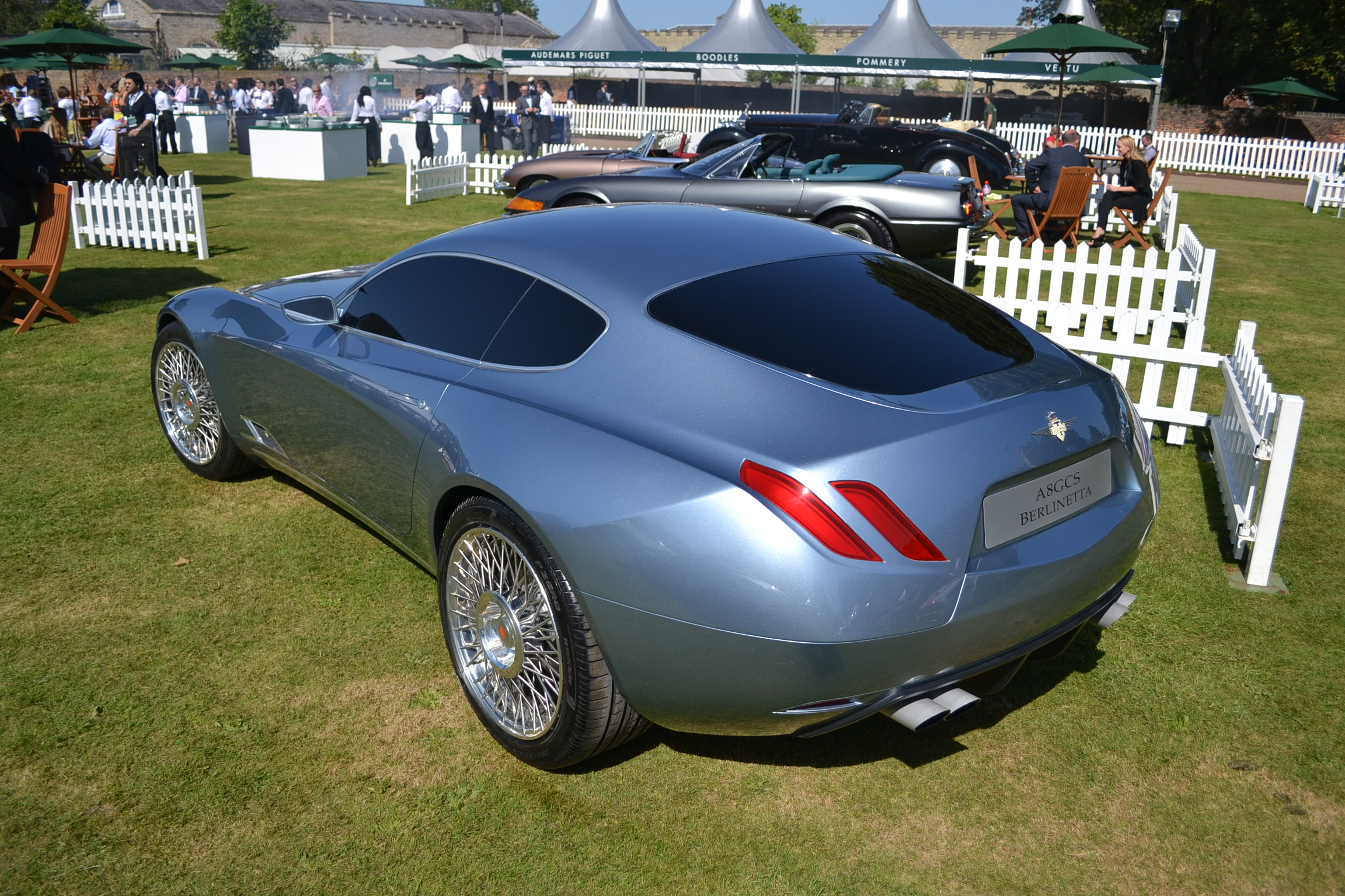 Salon Privé London 2012